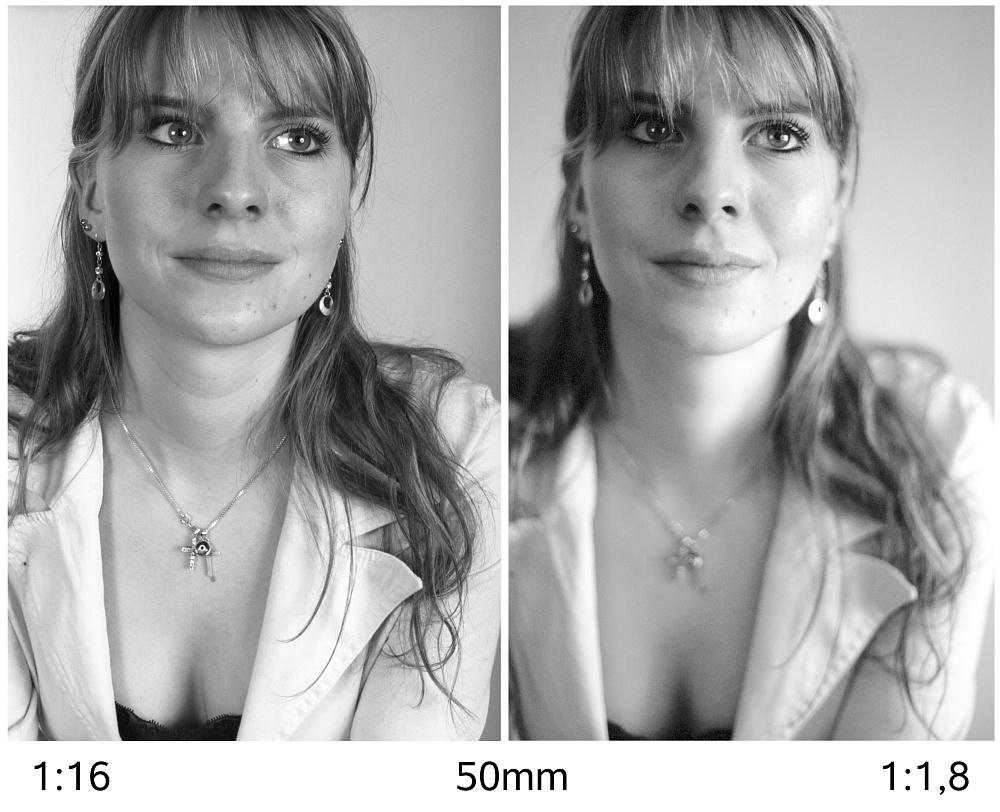 Beispiel für Schärfentiefe bei einem Portrait